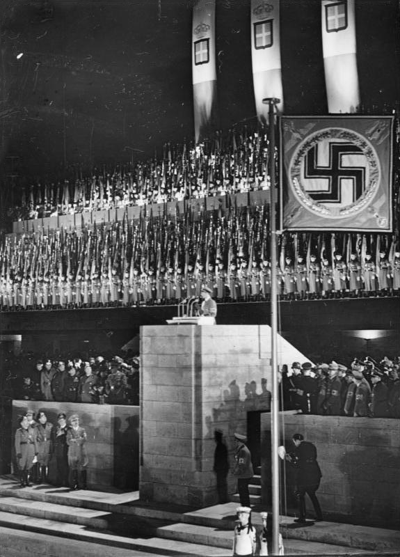 ADN-ZB/Archiv Berlin, 28. September 1937 Großkundgebung auf dem Maifeld anläßlich des Besuches von Mussolini; Reichsminister Joseph Goebbels spricht; links unterhalb der Tribüne Mussolini, Rudolf Heß (verdeckt), Graf Ciano, Hermann Göring, Adolf Hitler. 12511-37